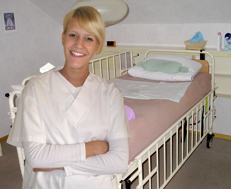 Schwester Janine aus Gelsenkirchen.